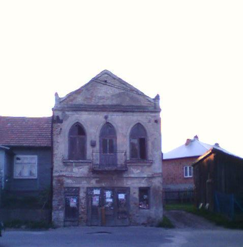 Zabytkowa remiza strażacka z 1924r.